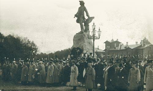 Peeter I kuju avamine Tallinnas Peetri platsil